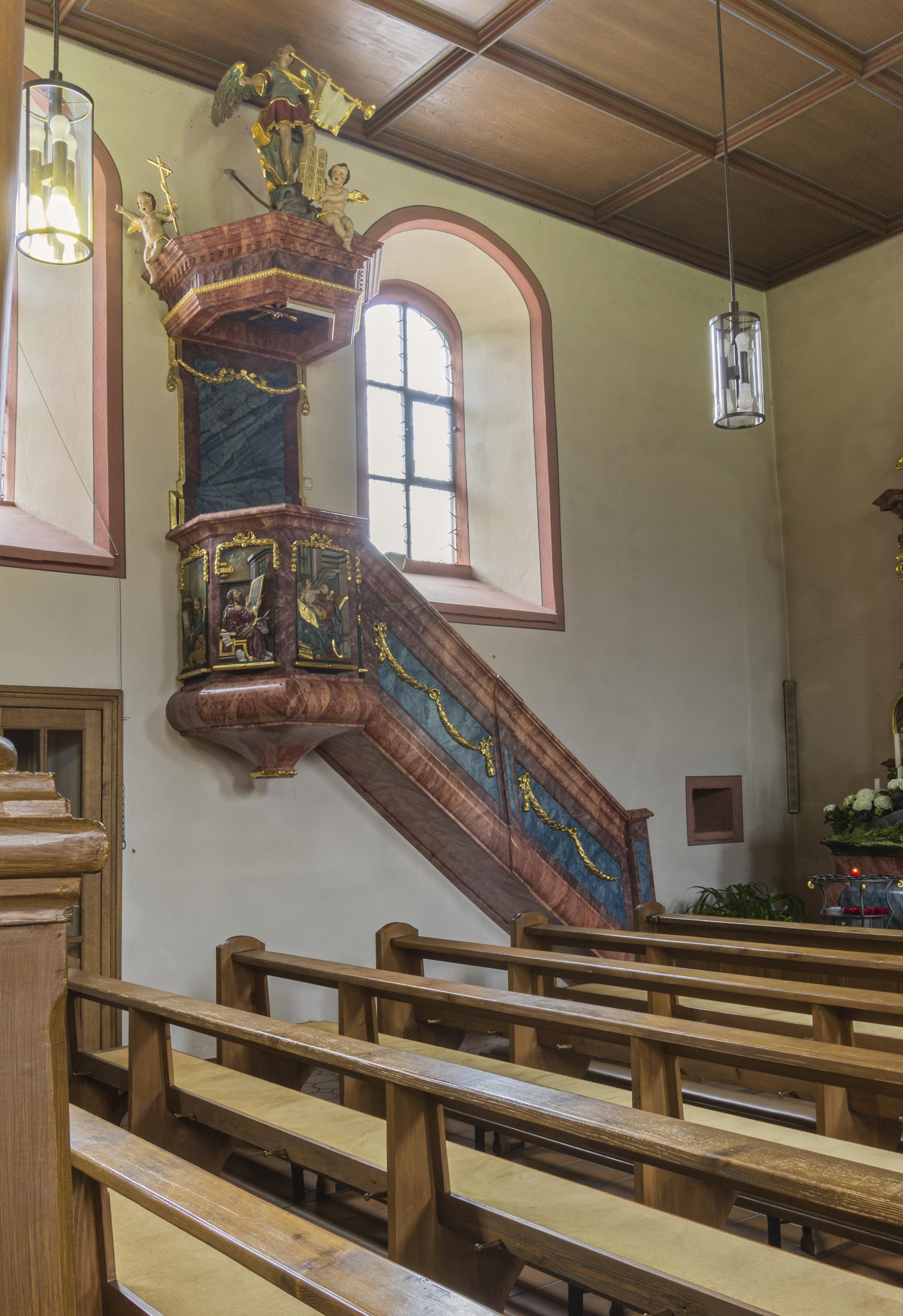 Bilder von der Pfarrkirche St. Mauritius in Prinzbach bei Biberach